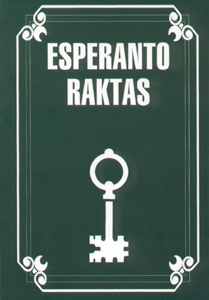 Esperanto raktas. Lietuvių kalba. 2003 metų leidimas. Autorius: Antanas Poška. Peržiūrėjo ir pataisė: Vytautas Šilas.